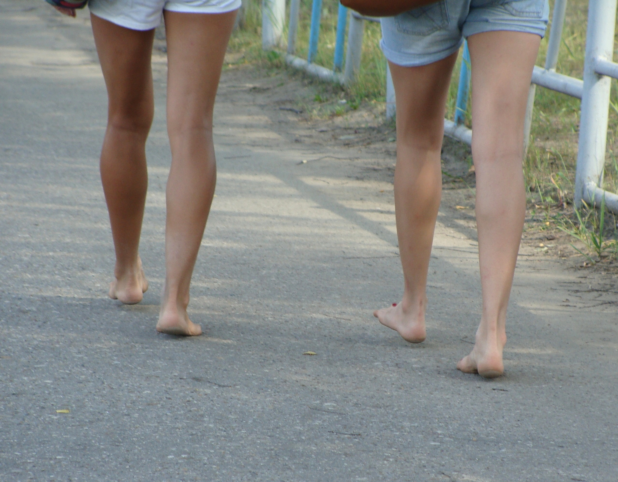 Босиком по асфальту